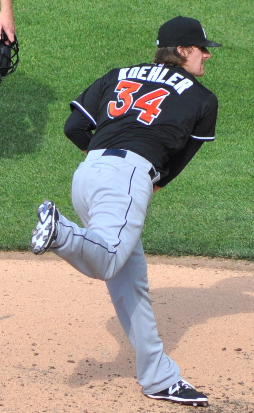 Tom Koehler